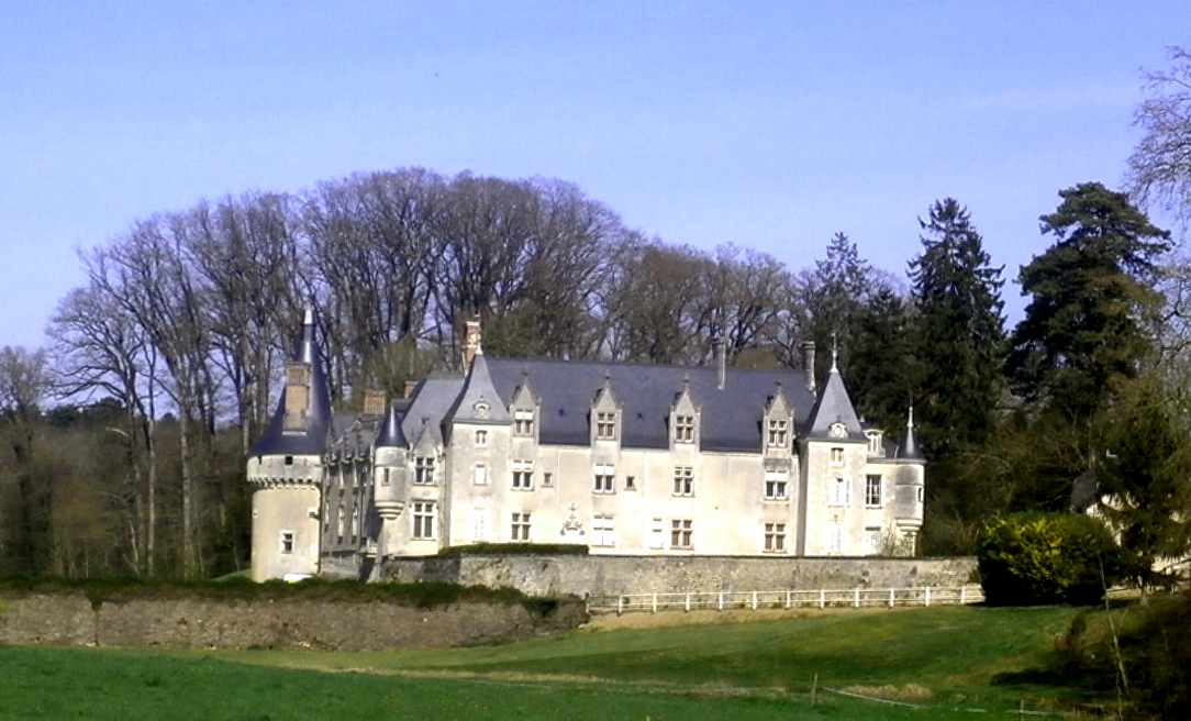 Château de l'Estang à Orbigny (façade ouest)